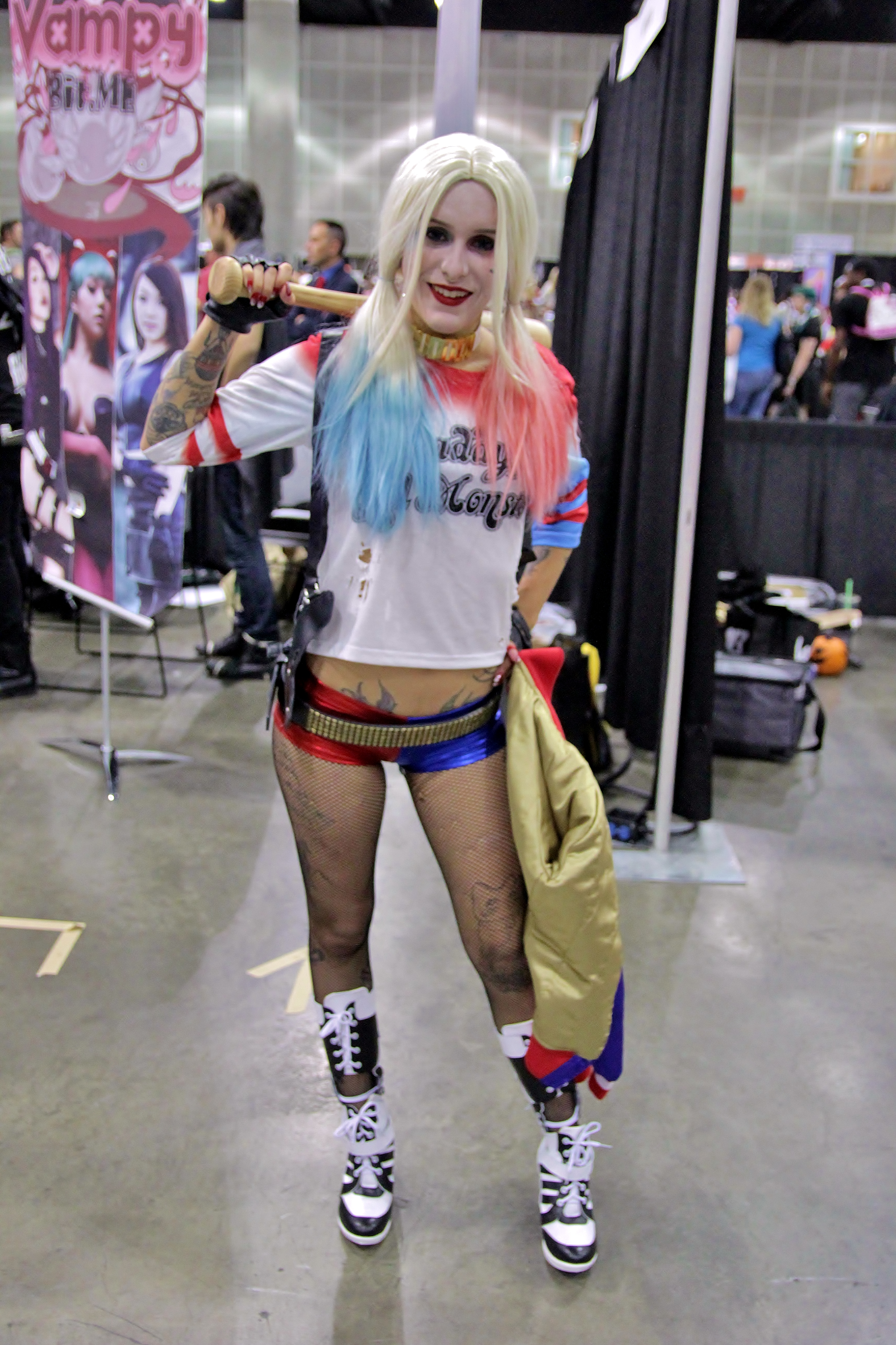 Cosplay at Comikaze Expo 2015.